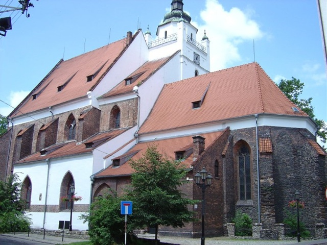 Widok od strony południowej